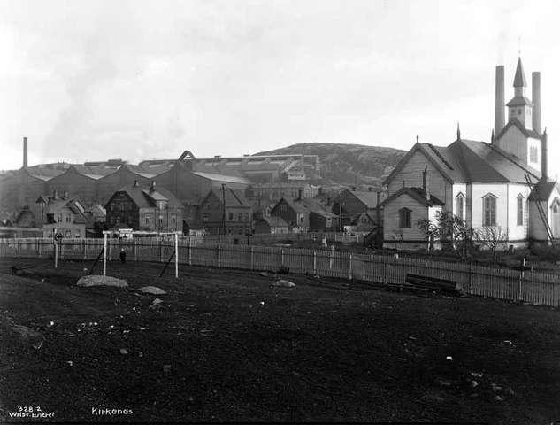 Kirkenes, Norway